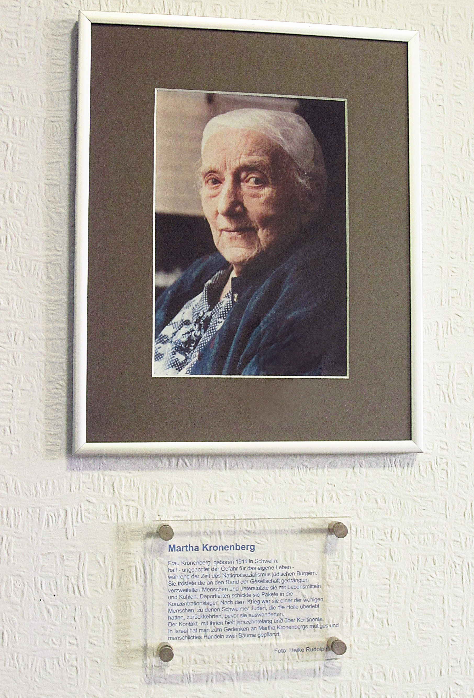 Gerahmtes Porträtbild Martha Kronenbergs mit Erläuterungstafel, angebracht im Rathaus der Stadt Schwelm (Hauptstraße 14, 1. Stock, rechts vor dem Eingang zum großen Sitzungssaal). Fotografin des Porträts aus dem Jahr 2009 ist Heike Rudolph (vgl. Tafel). Martha Kronenberg ist auf dem Foto etwa 98 Jahre alt. Die Anbringung von Bild und Tafel im Jahr 2009 sollte der Würdigung einer verdienstvollen Bürgerin der Stadt dienen.